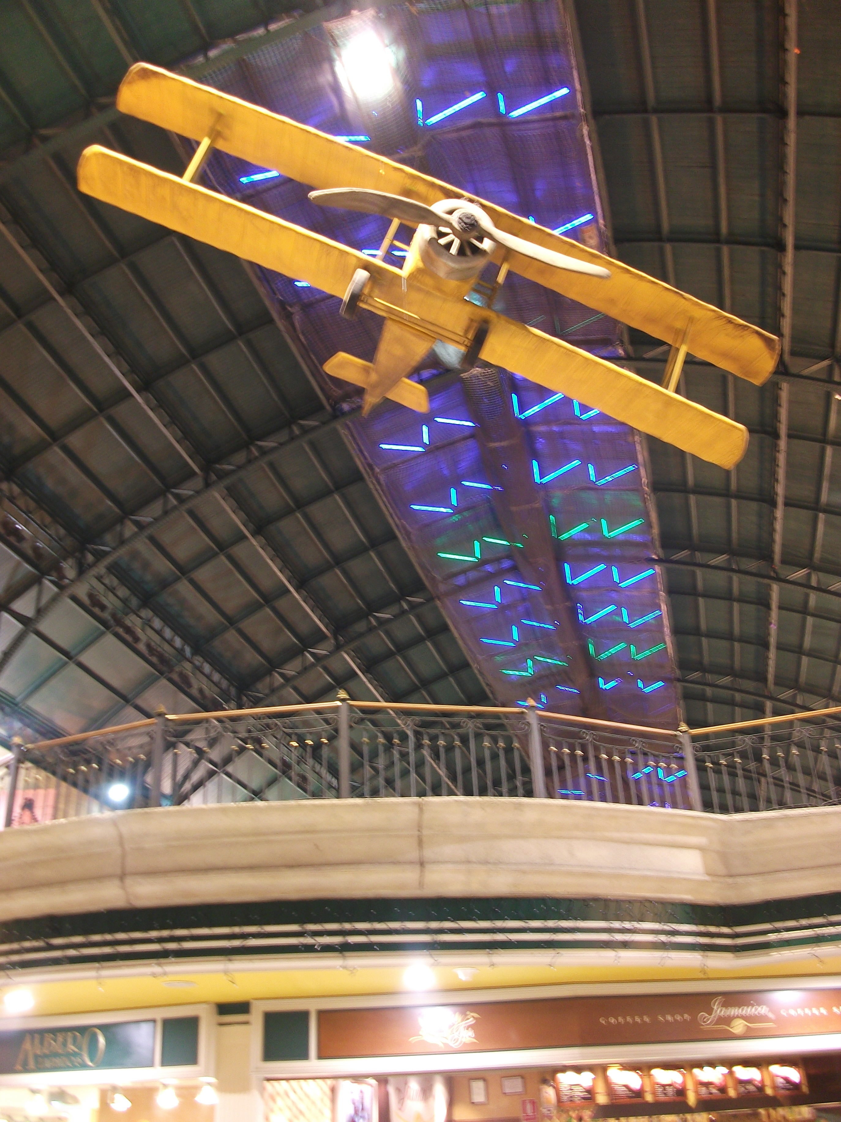 Decoración interior del centro comercial Plaza de Armas. Noviembre de 2010